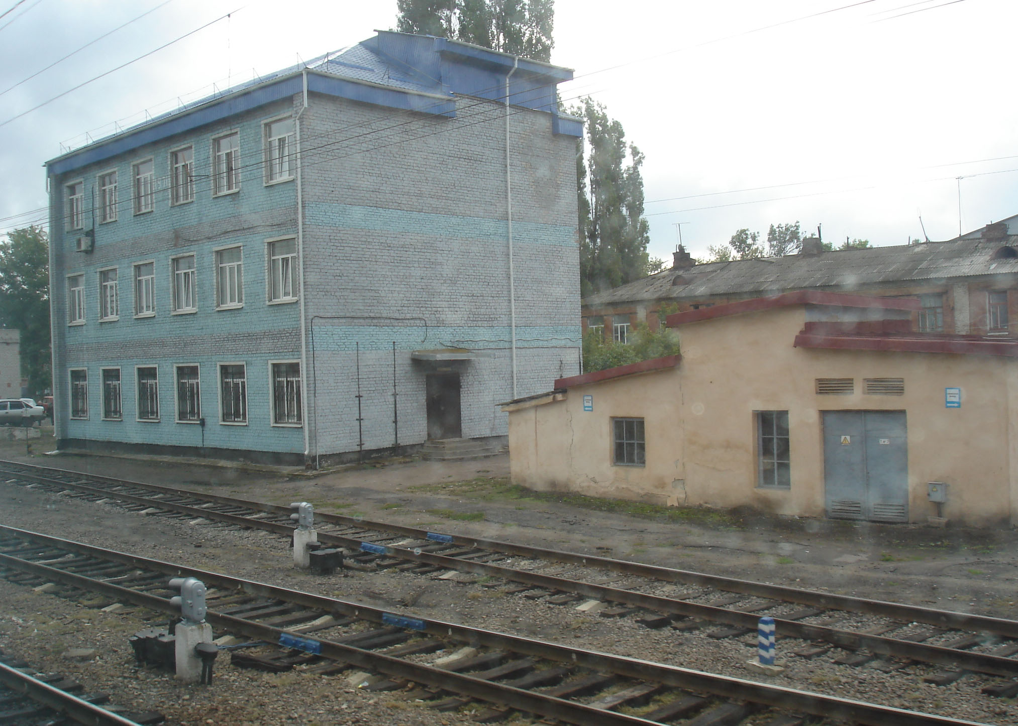 Станционное здание Таловой